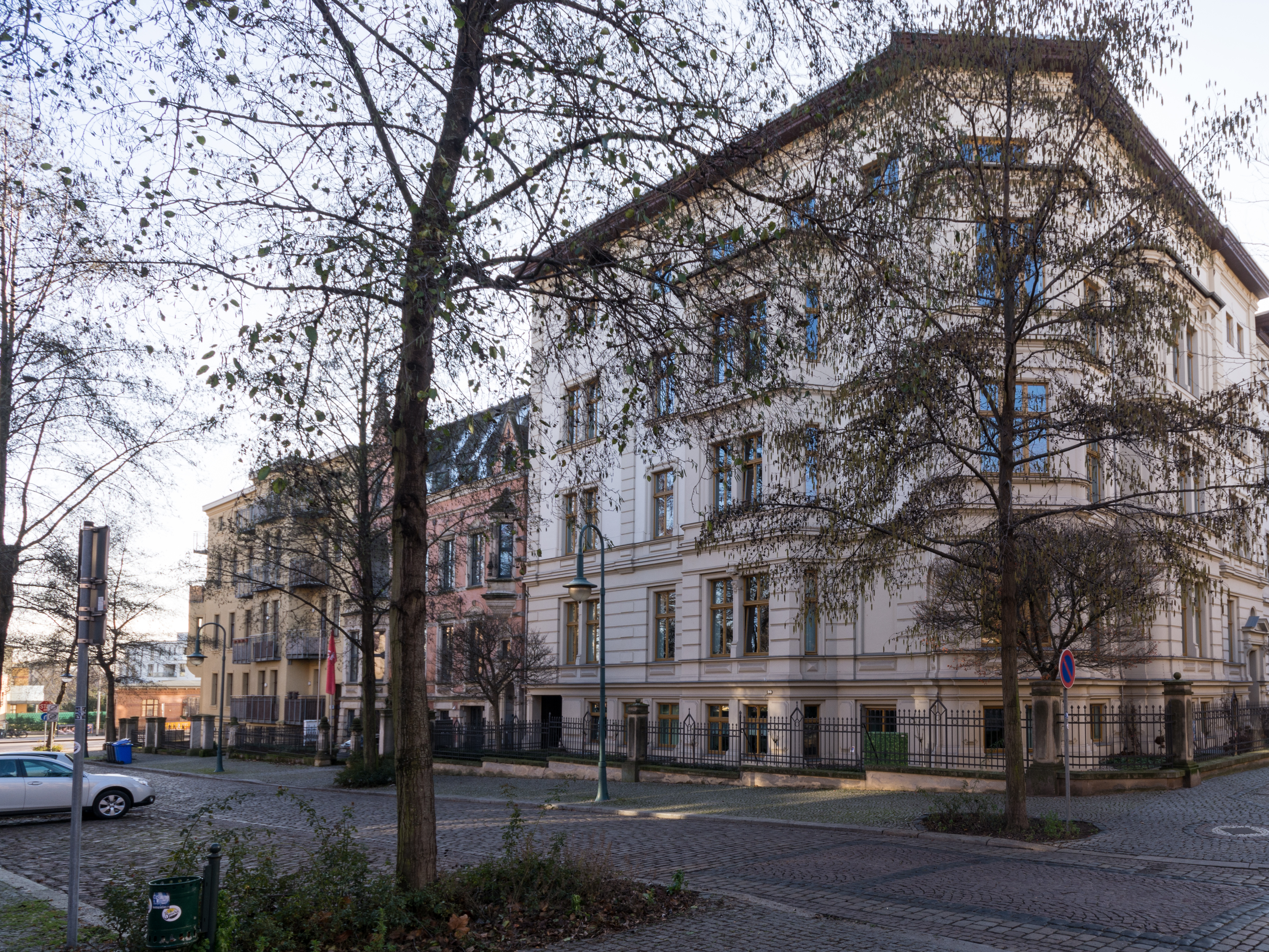 Straßenzeile Bürgelstraße 1, 2 in Magdeburg-Altstadt mit dem Eckgebäude Hegelstraße 40-42. This is a photograph of an architectural monument. 18281